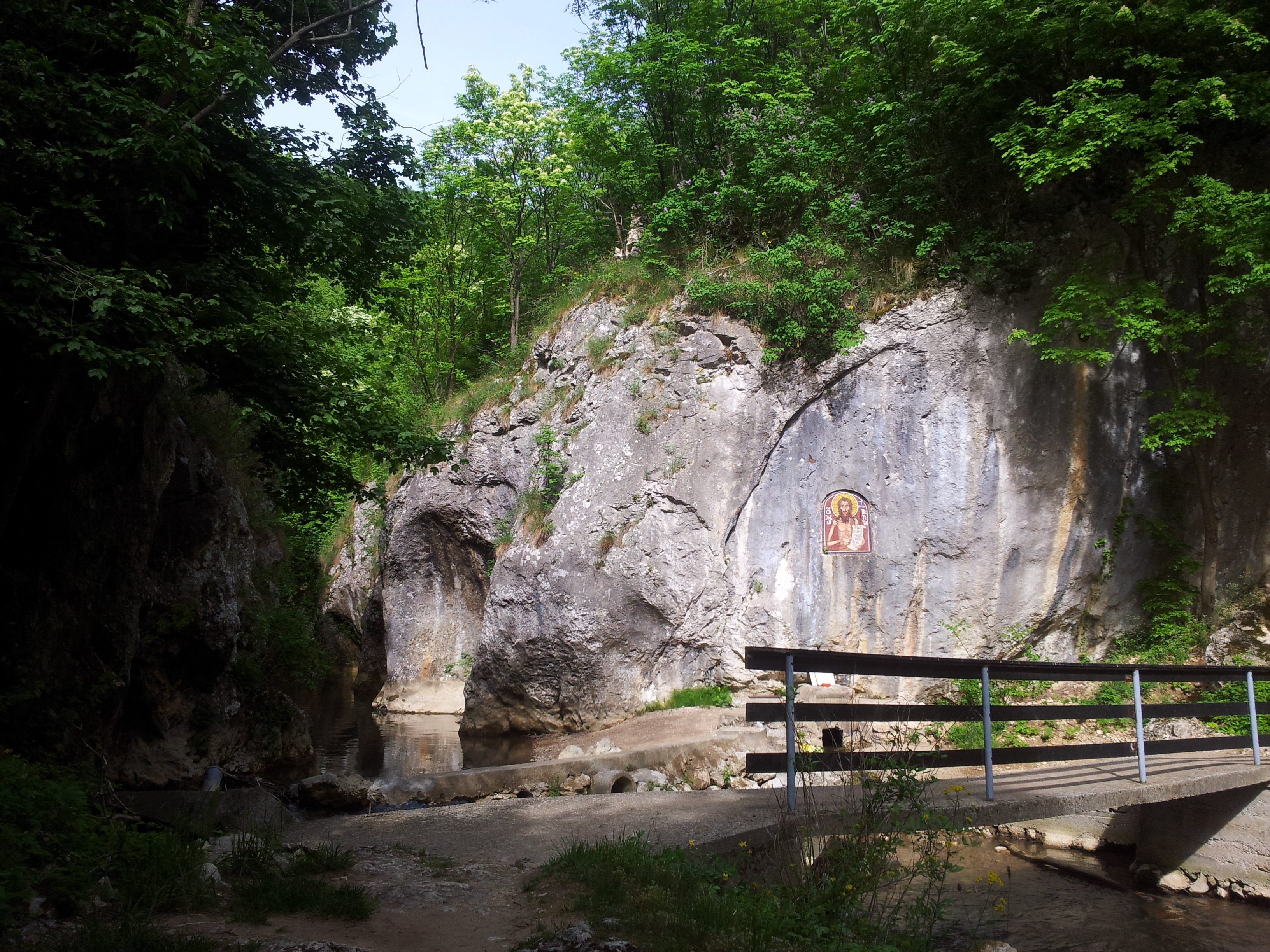 Izvor Svetog Jovana kod manastira Vitovnice3